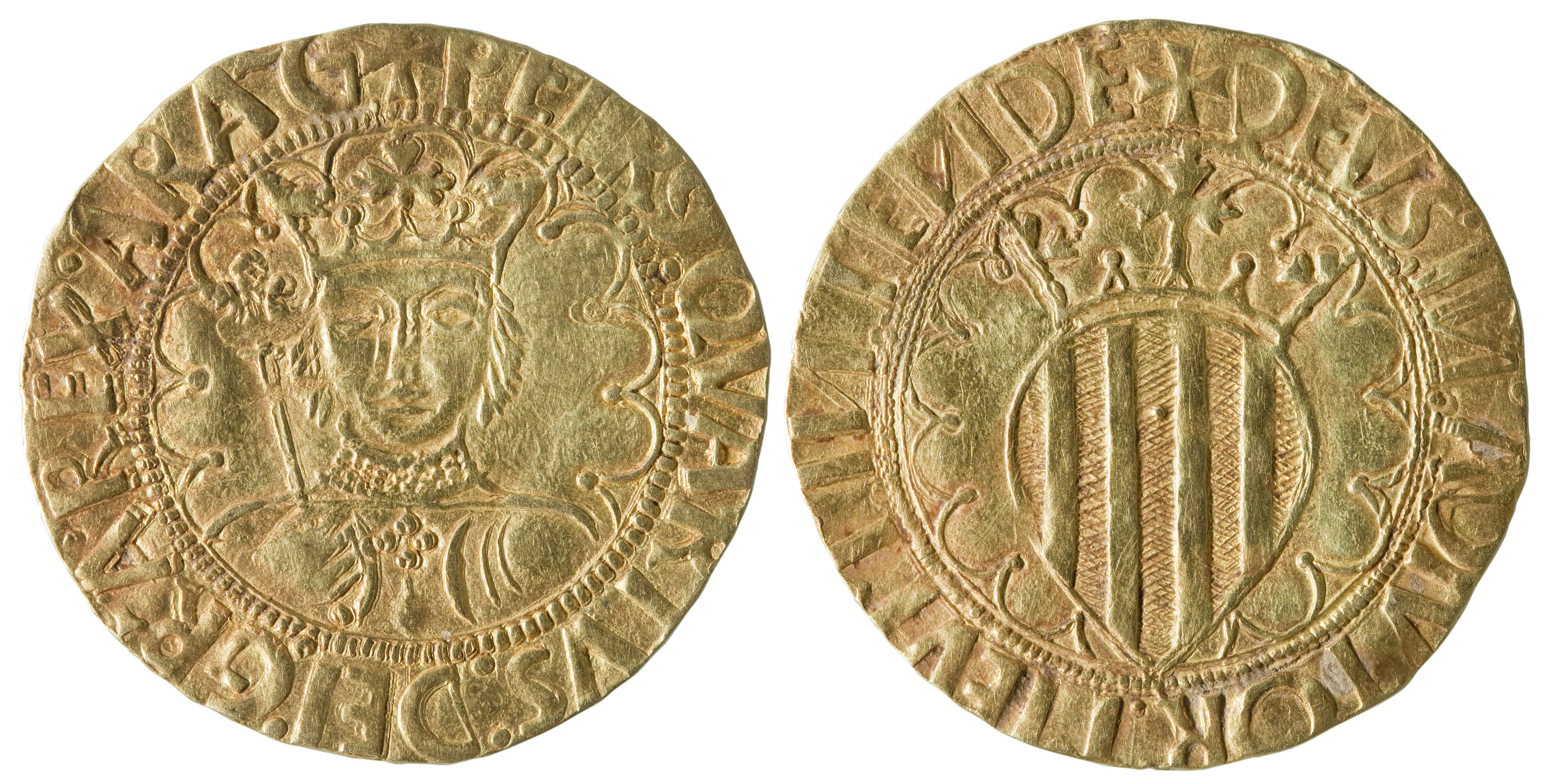 Pacífic d'or de Barcelona, Pere IV. Museu Nacional d'Art de Catalunya). El Departament de Cultura de la Generalitat de Catalunya va adquirir el 2015 i dipositar al museu un excepcional exemplar de pacífic d’or de Barcelona de Pere IV, dit el Conestable de Portugal. Pere IV, infant portuguès i nét del darrer comte d’Urgell, va ser proclamat rei d'Aragó i comte de Barcelona durant la Guerra Civil (1462-1472) que va enfrontar les institucions de Catalunya amb Joan II, el Sense Fe. Per aquest motiu arrossega històricament l’estigma de rei intrús i proscrit. A partir del dia 10 de maig de 2016, la moneda recentment adquirida s’exposa a les sales del Gabinet Numismàtic.